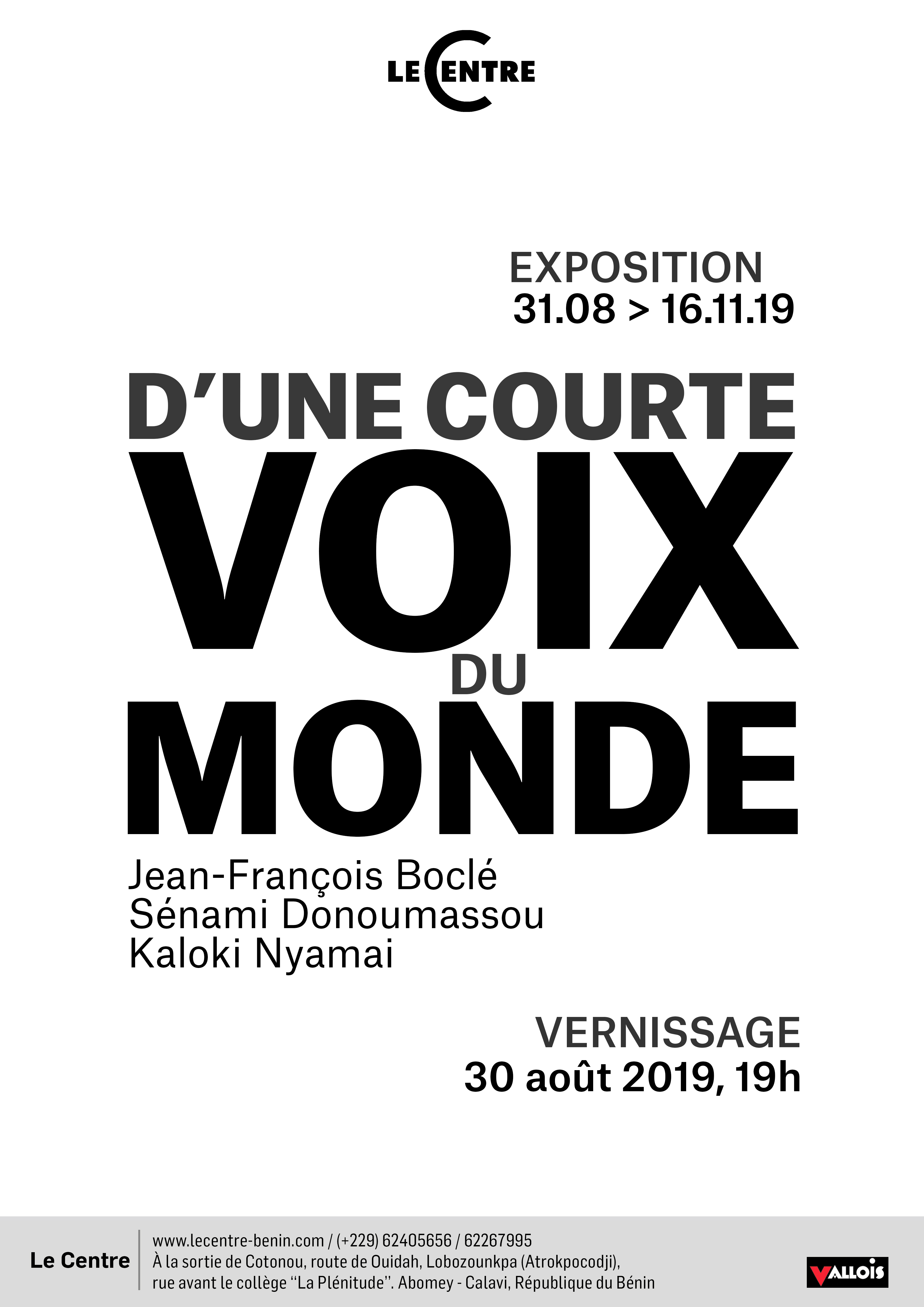 Affiche de l'exposition